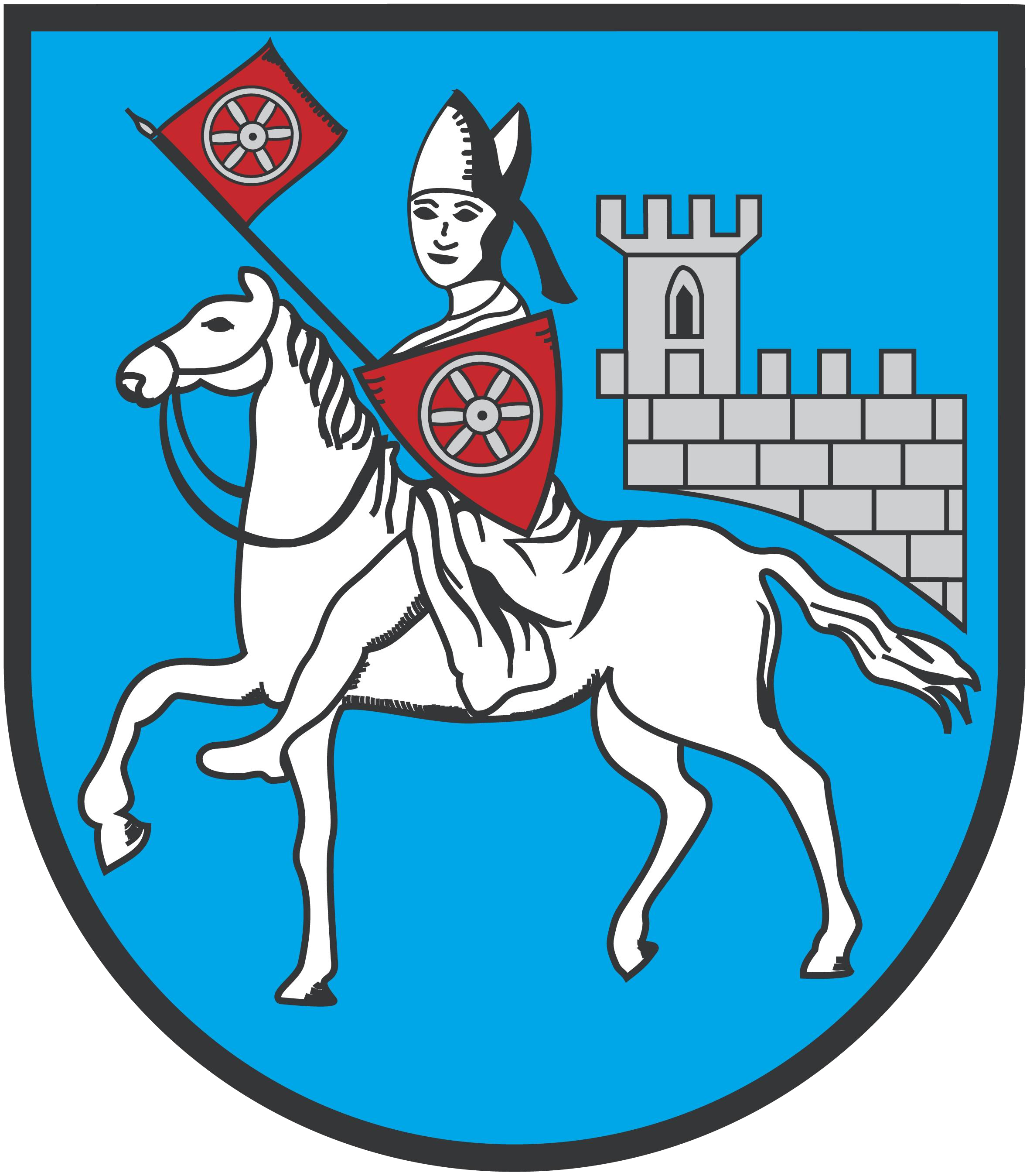 Das Wappen der Stadt Heilbad Heiligenstadt